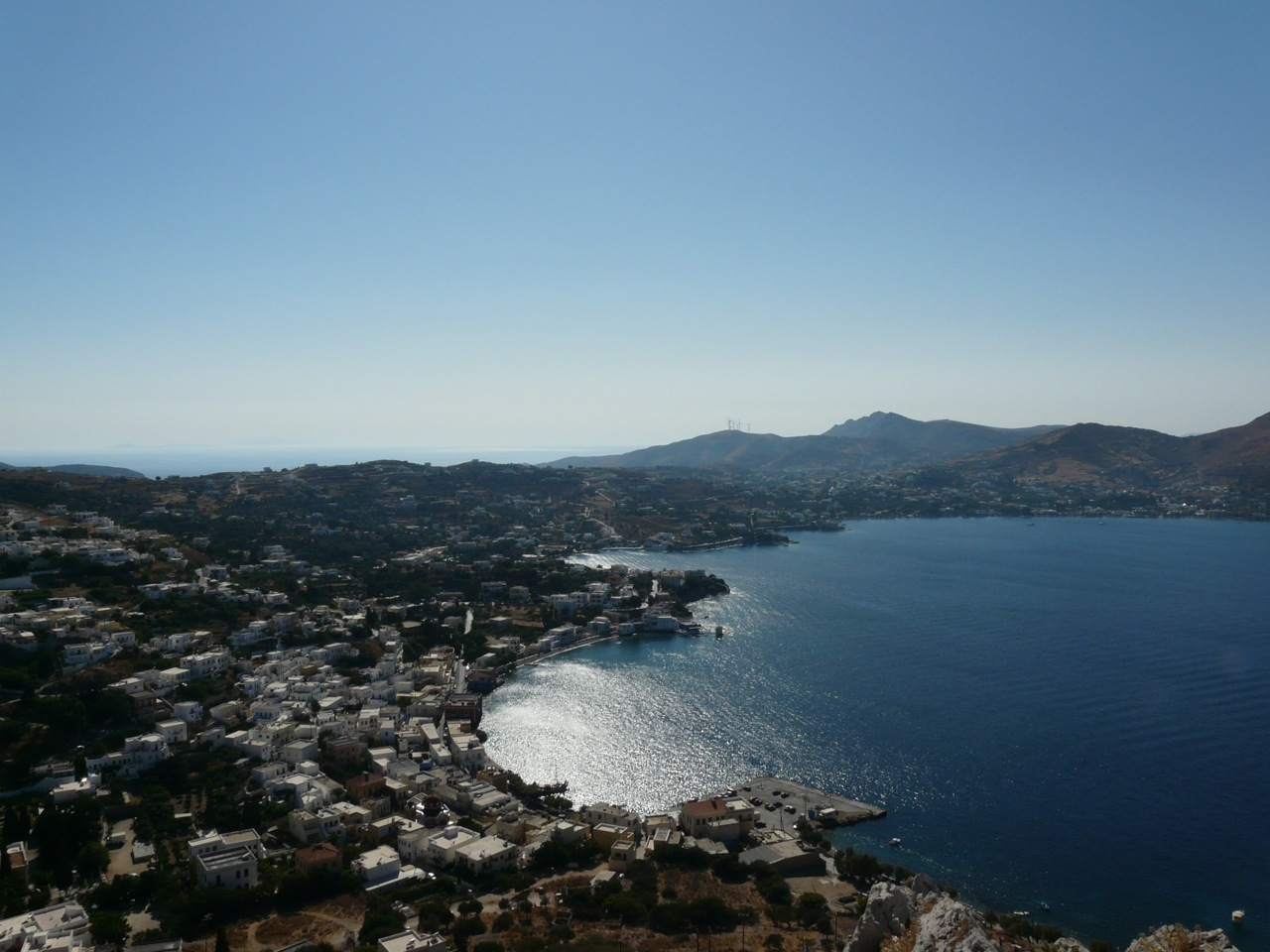 Agia Marina